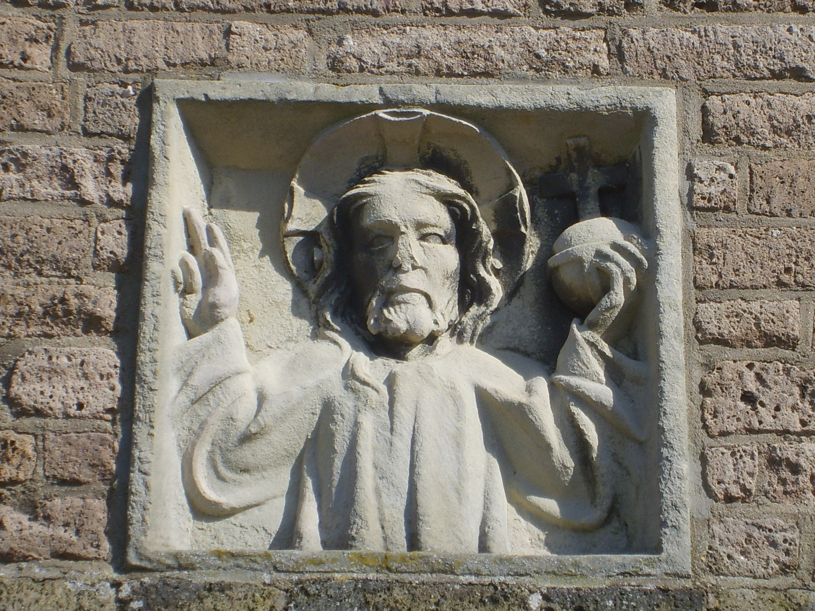 Zandstenen relief van Christus met wereldbol in de westgevel van de toren van de Sint-Andreaskerk te Groessen